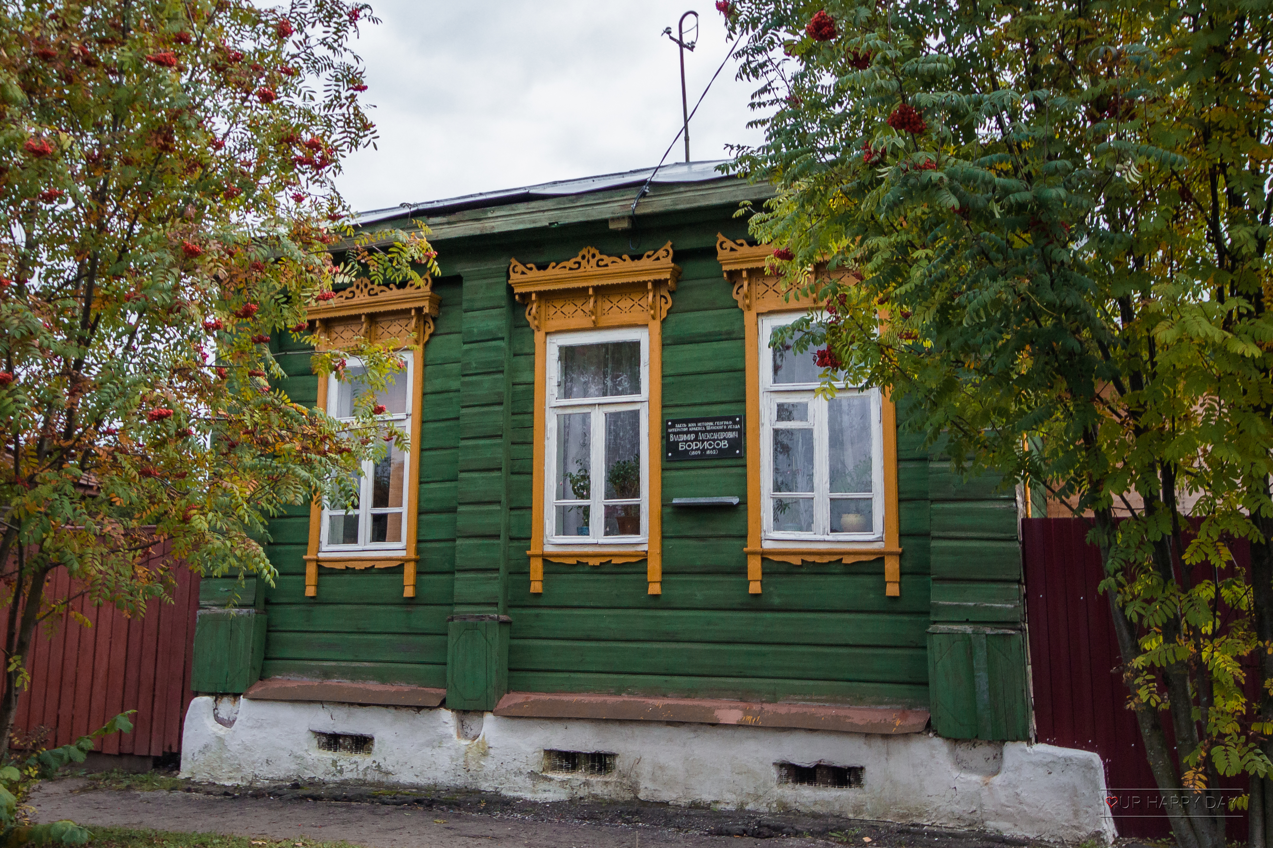 Жилой деревянный дом в котором прожил всю сознательную жизнь краевед Борисов Владимир Александрович: Зинаиды Касаткиной улица, Шуя, Ивановская область